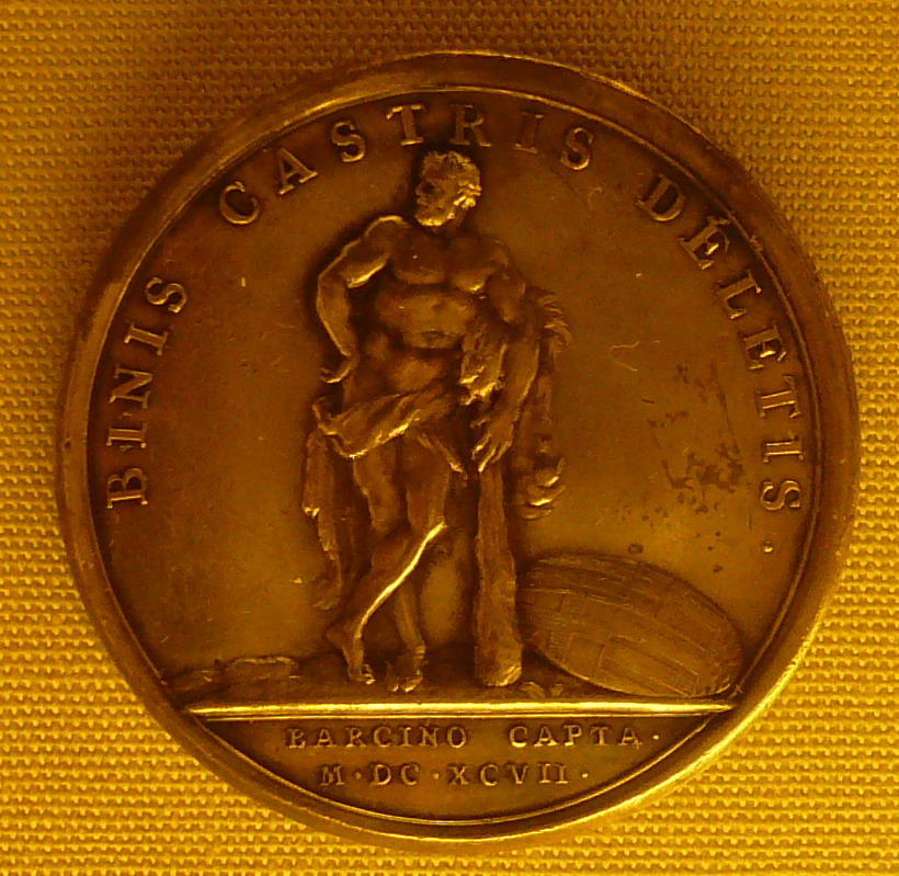 Medalla commemorativa. Col·lecció de numísmàtica del Museu Nacional d'Art de Catalunya.